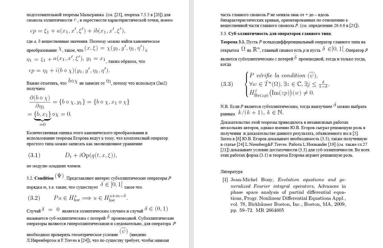 статья